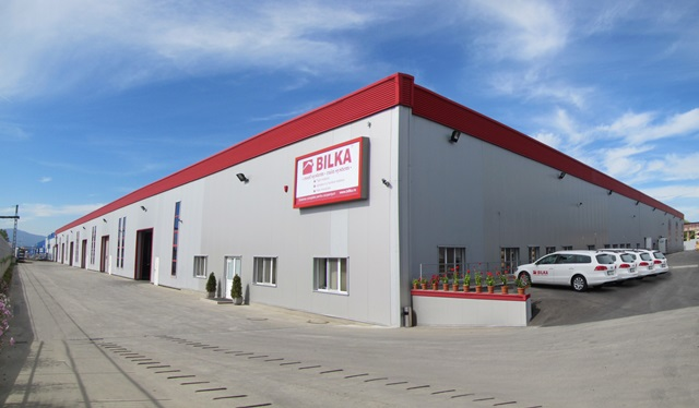 BILKA STEEL SRL Adresa: Brașov, str. Henri Coandă nr. 17 Tel: 0268/548.117